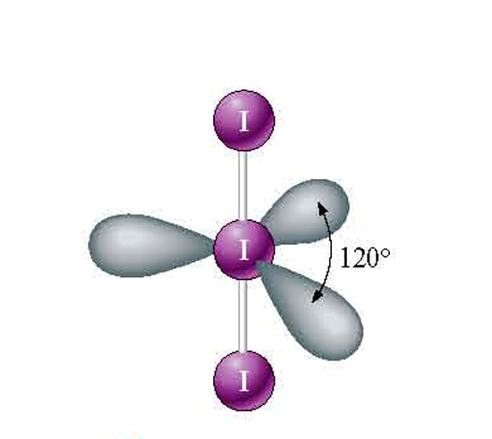 Disposizione orbitali dello ione triioduro